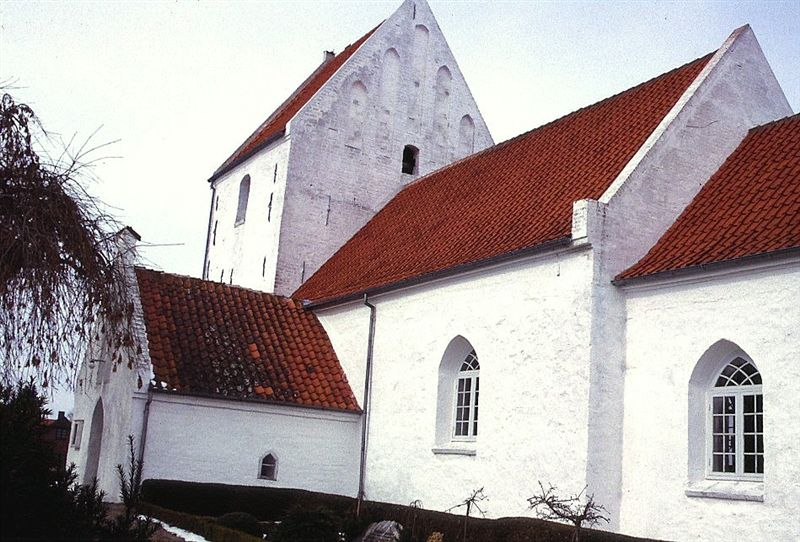 Ørslev Kirke (Kalundborg Kommune) i Danmark. Ørslev kirke